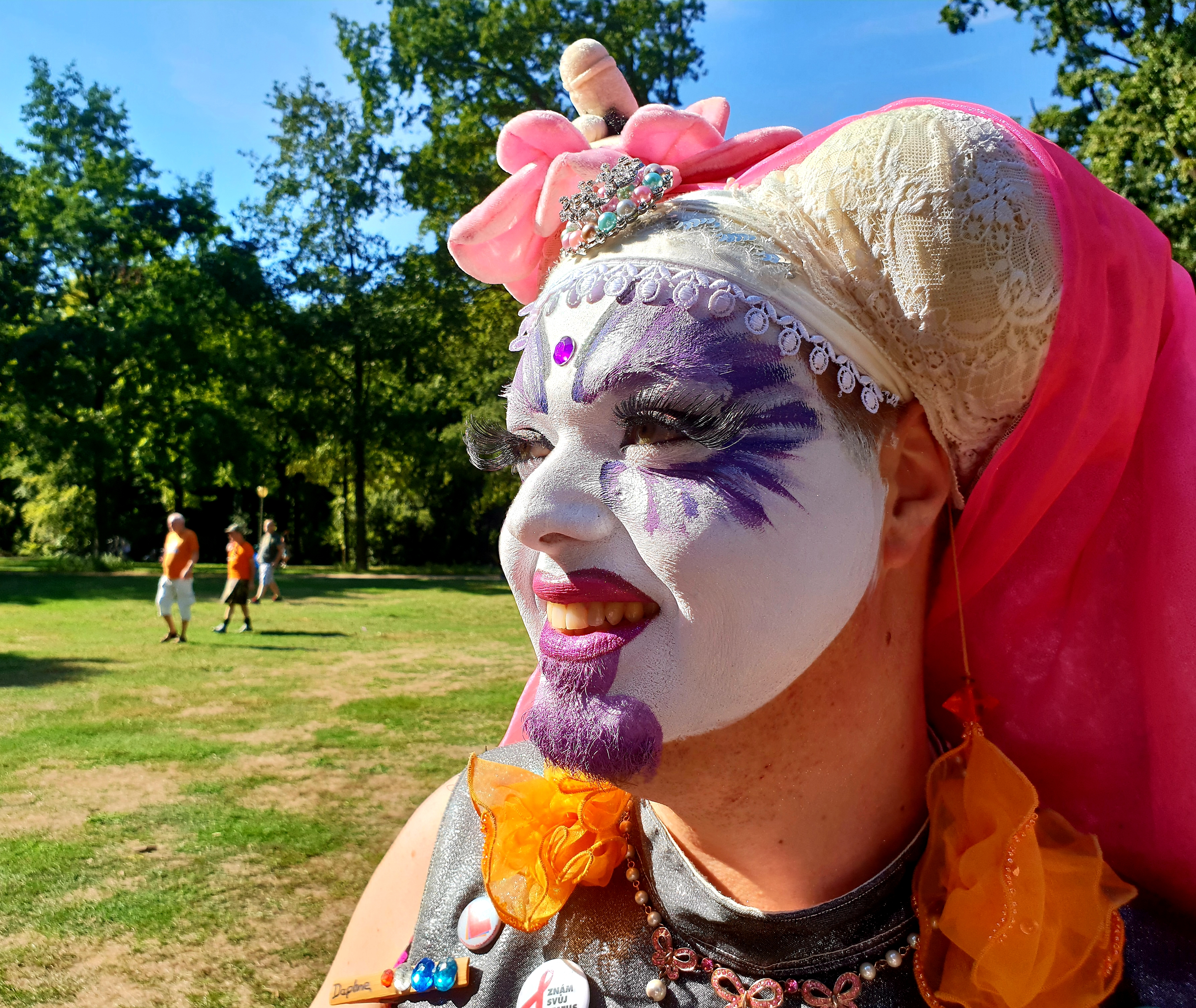 Schwester Daphne Sara Maria Sanguina Mater d'Or OSPI, Meisterin der Zeremonien. 12. August 2018, beim Tiergartenpicknick des „Orden der Schwestern der Perpetuellen Indulgenz – Haus Sankta Melitta Iuvenis e.V.“ in Berlin.